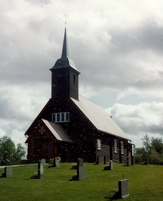 Hitterdal kapell